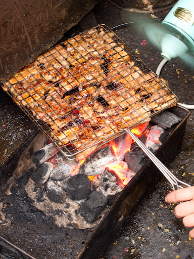 Grilling chả.